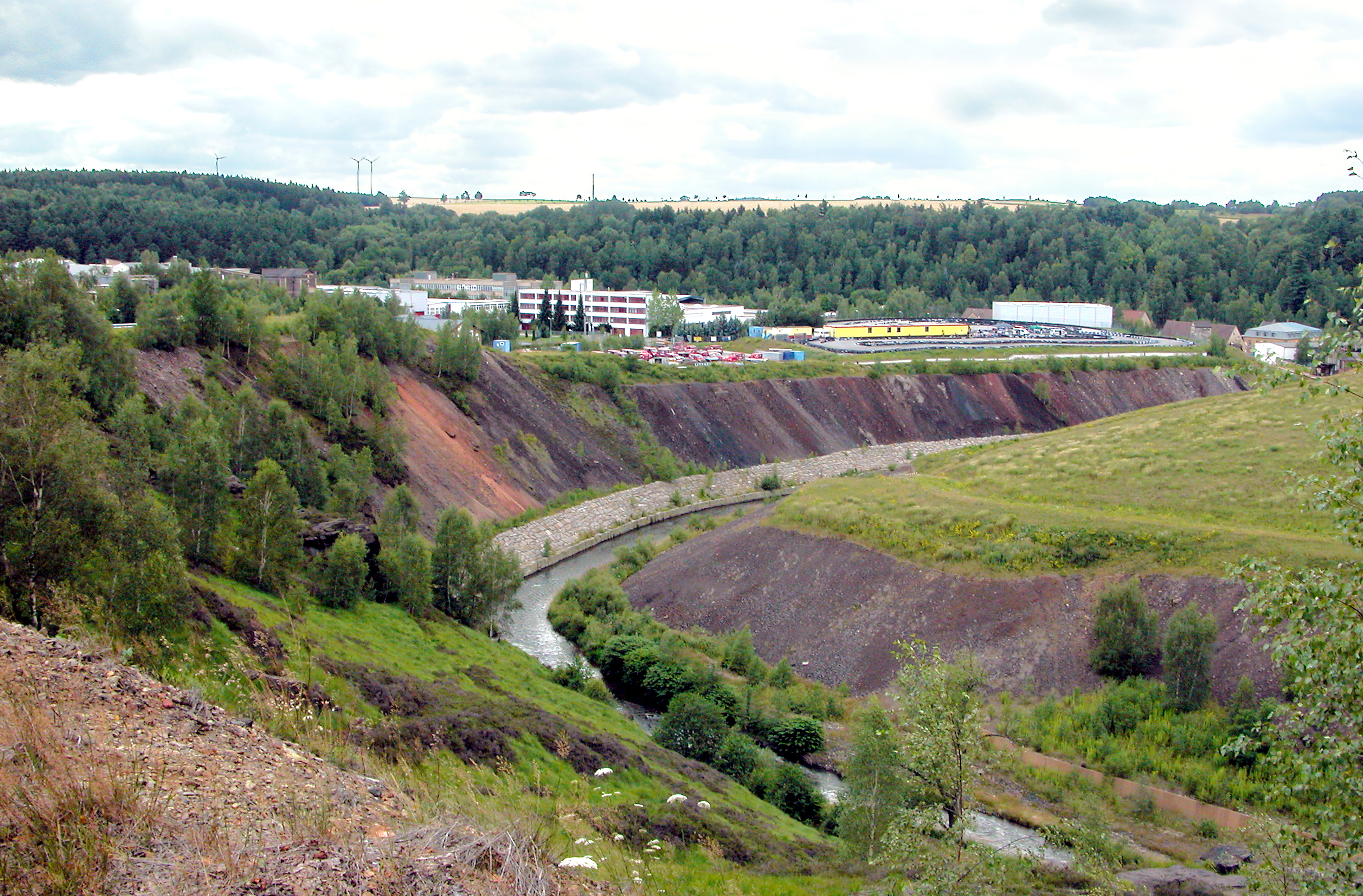 23.07.2011 09627 Hilbersdorf-Muldenhütten (bei Freiberg Sa): Blick von der Bahnhofszufahrt Muldenhütten auf einen Teil der Muldenhütte (GMP: 50.902750,13.384370). Rechts eine Cart-Bahn. [DSCNn2617.TIF]20110723430DR.JPG(c)Blobelt